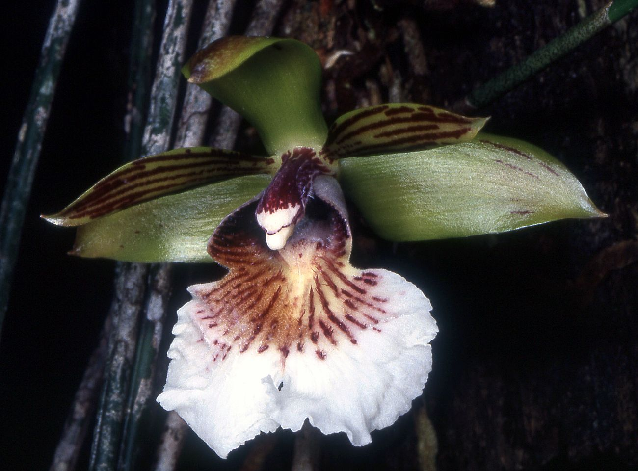 Scuticaria salesiana - flower